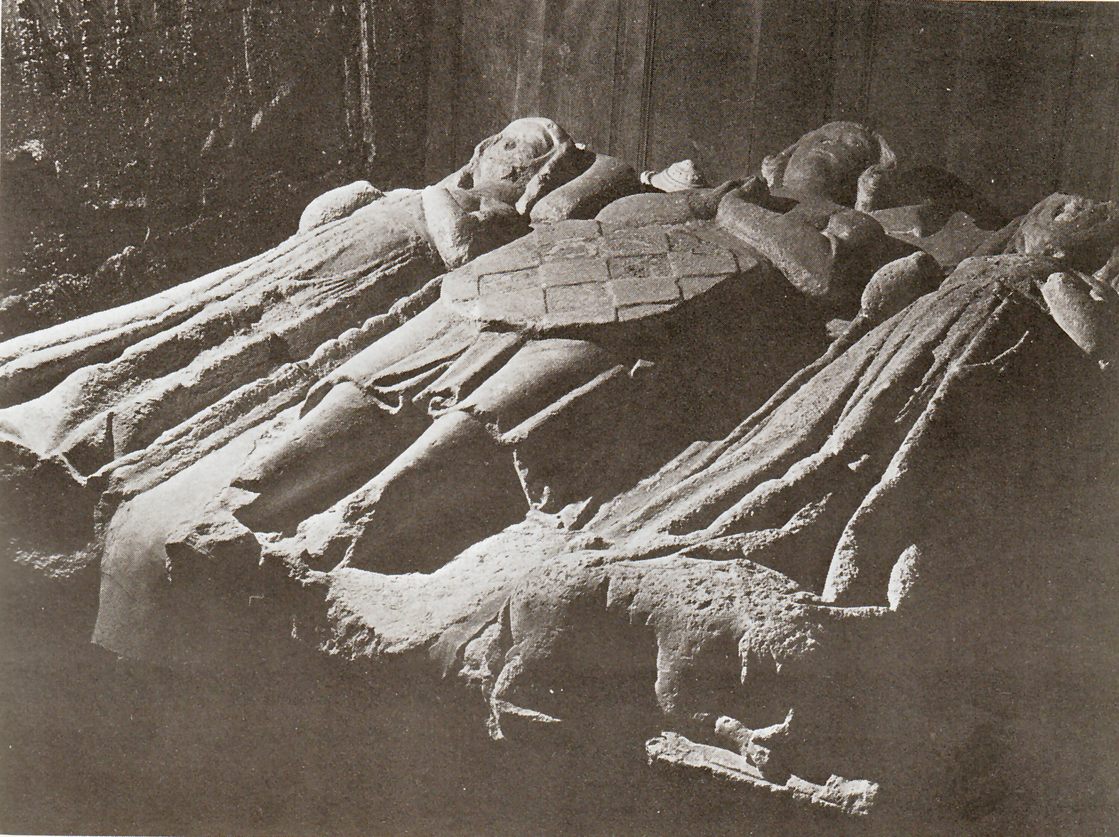 Oissery, Tombeau du Chevalier Jean des Barres (petit-fils de Guillaume II des Barres).